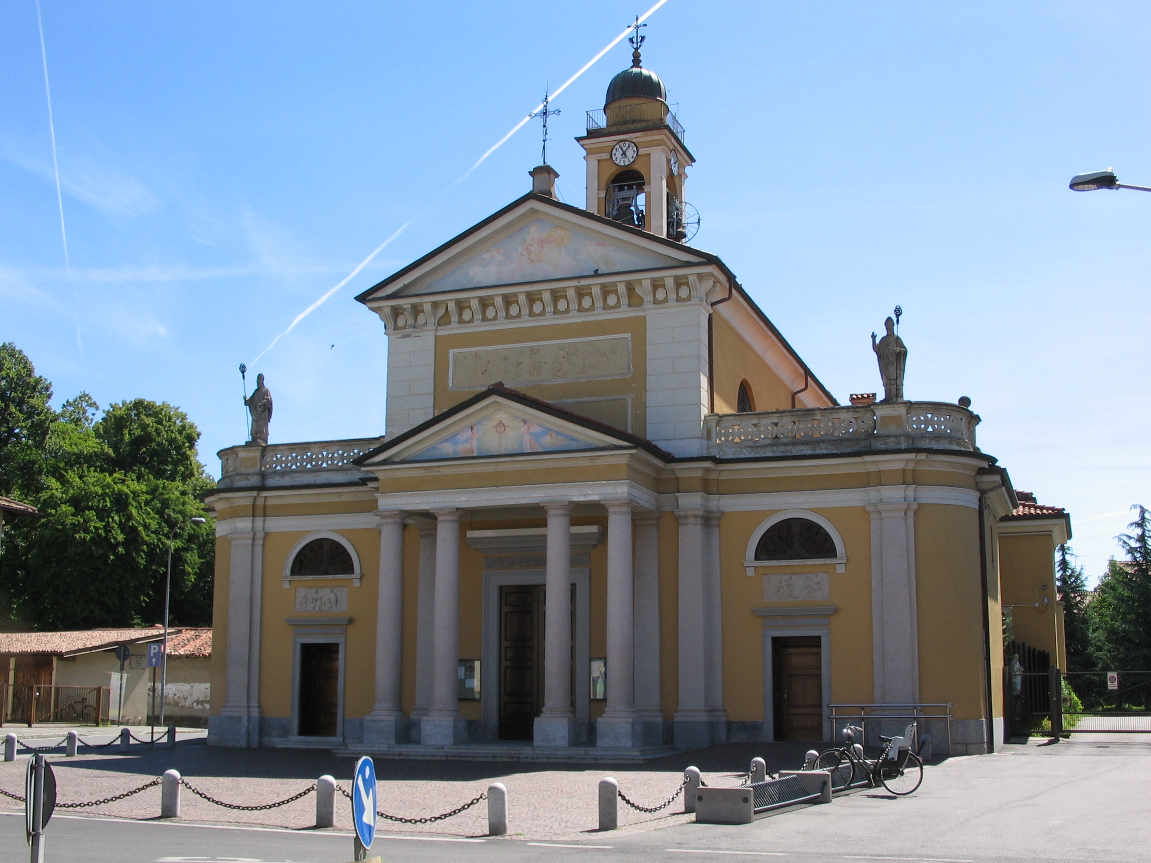 Lomagna, SS Pietro e Paolo.